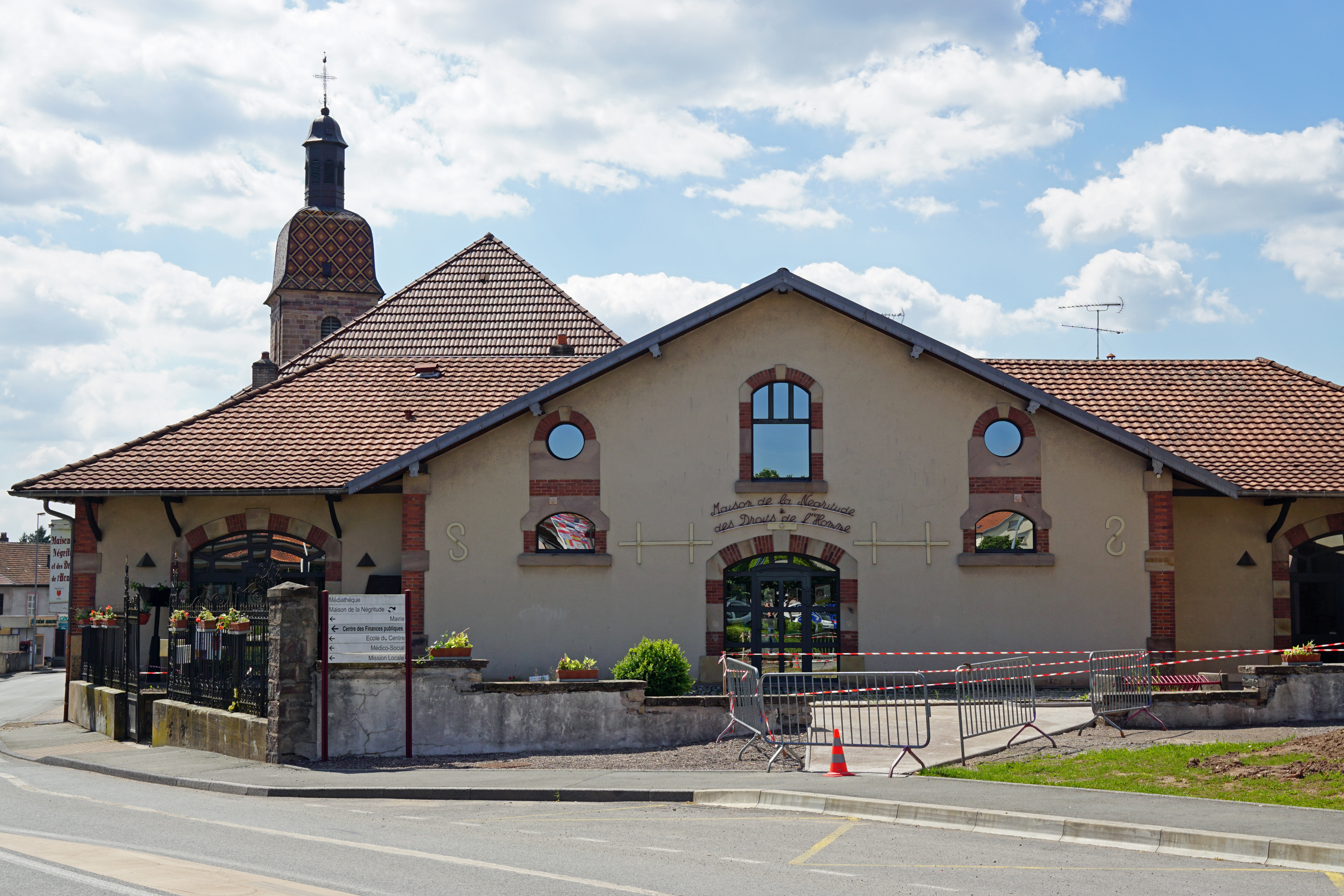 La Maison de la Négritude et des droits de l'Homme à Champagney (70).